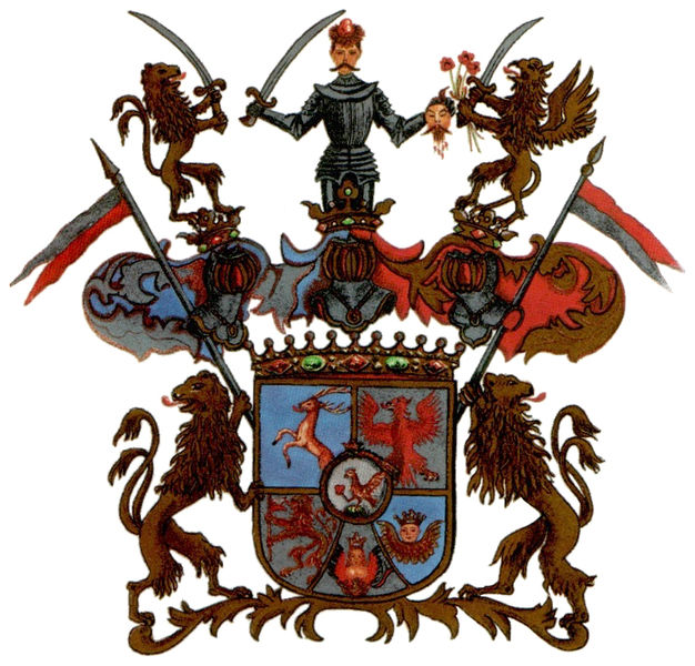 Armoiries de la famille comtale hongroise "Károlyi de Nagykároly".